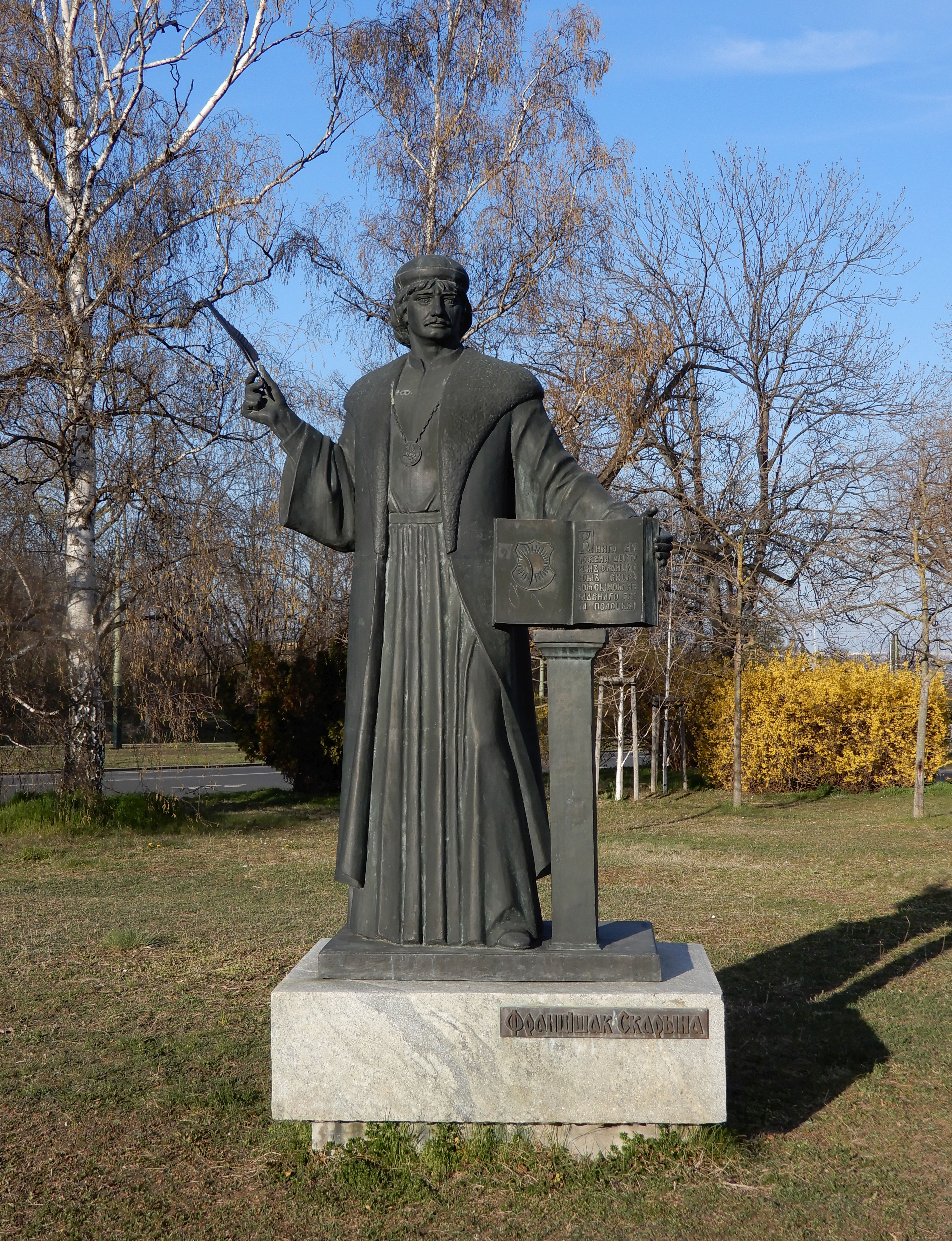 František/Francisko Skoryna - pomník v Praze 1 - HradčanyJelení ulice, bronz